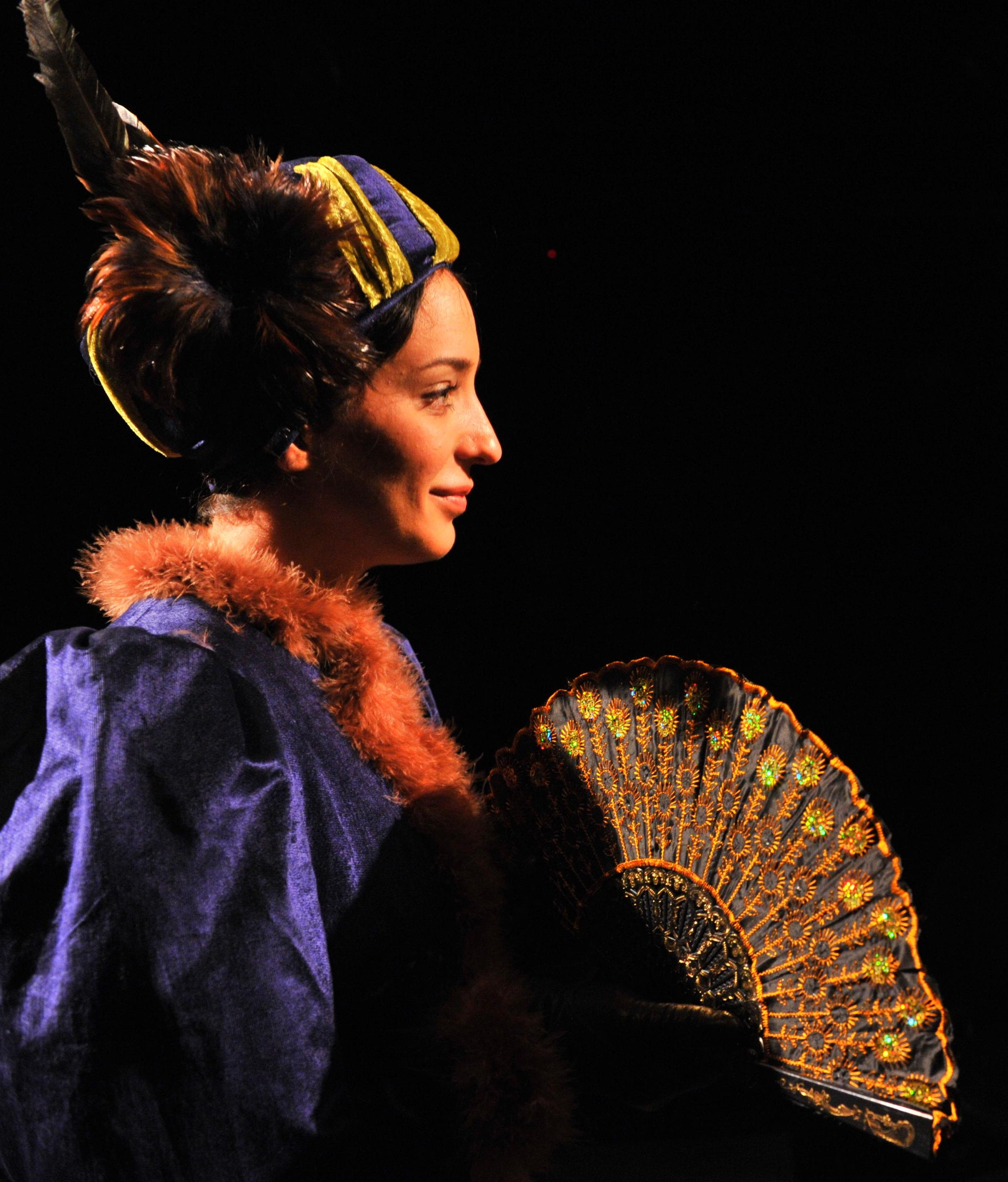 גאווה ודעה קדומה